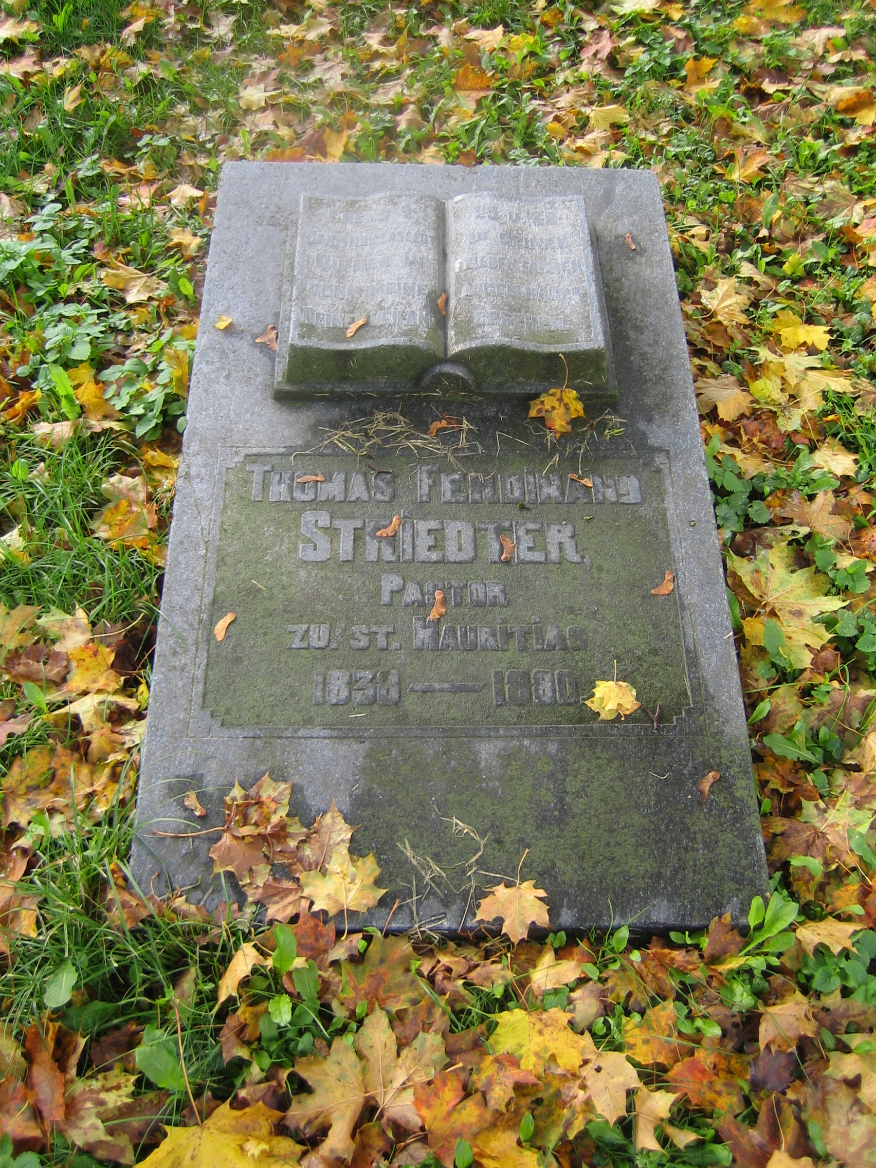 Haljala pastori Thomas Ferdinand Striedteri haud Haljala kirikuaias